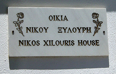 Mehr Informationen zu Kreta auf meiner Homepage: Kreta – Mein erstgeborenes Land